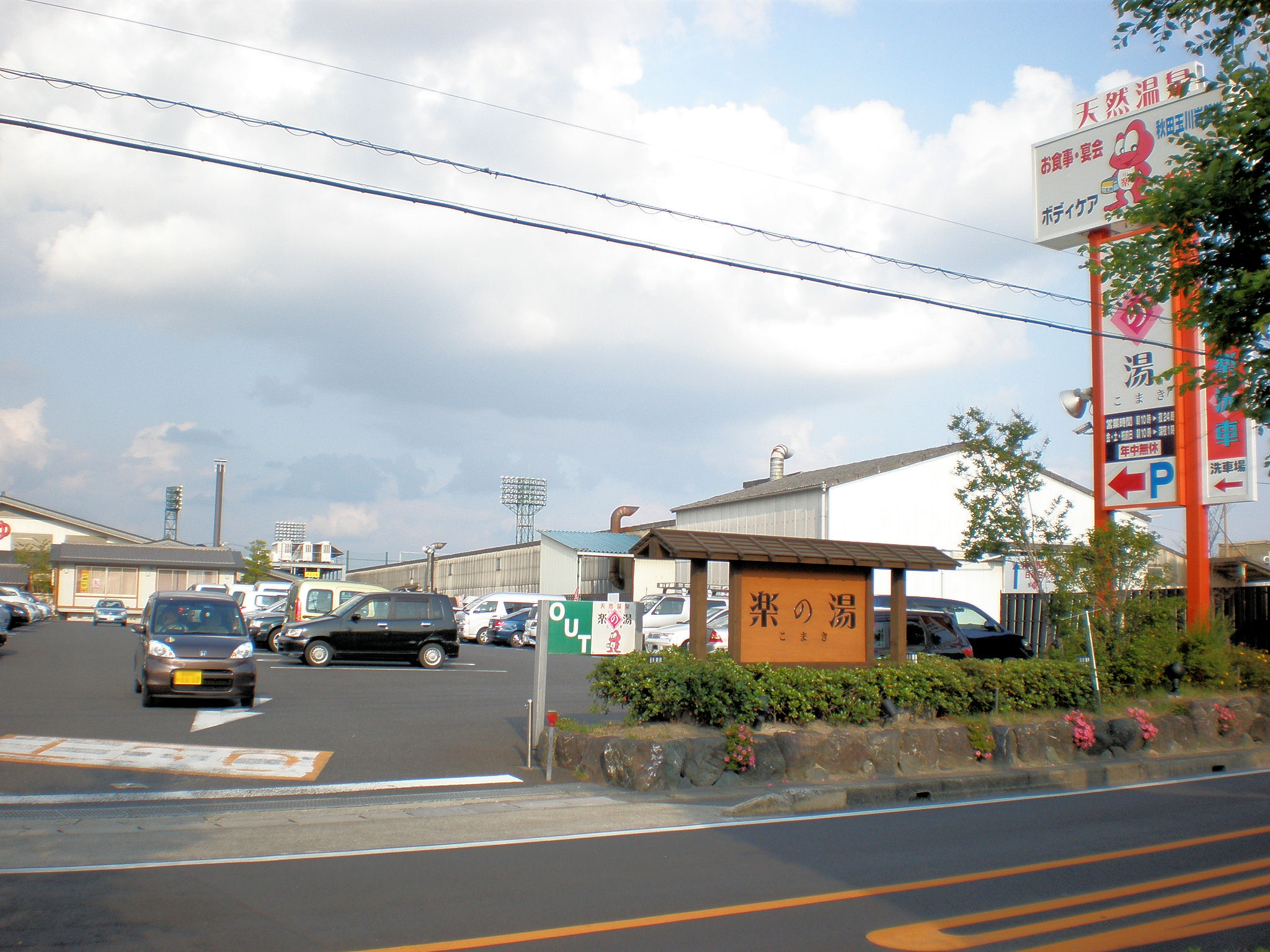 愛知県小牧市にあるこまき楽の湯